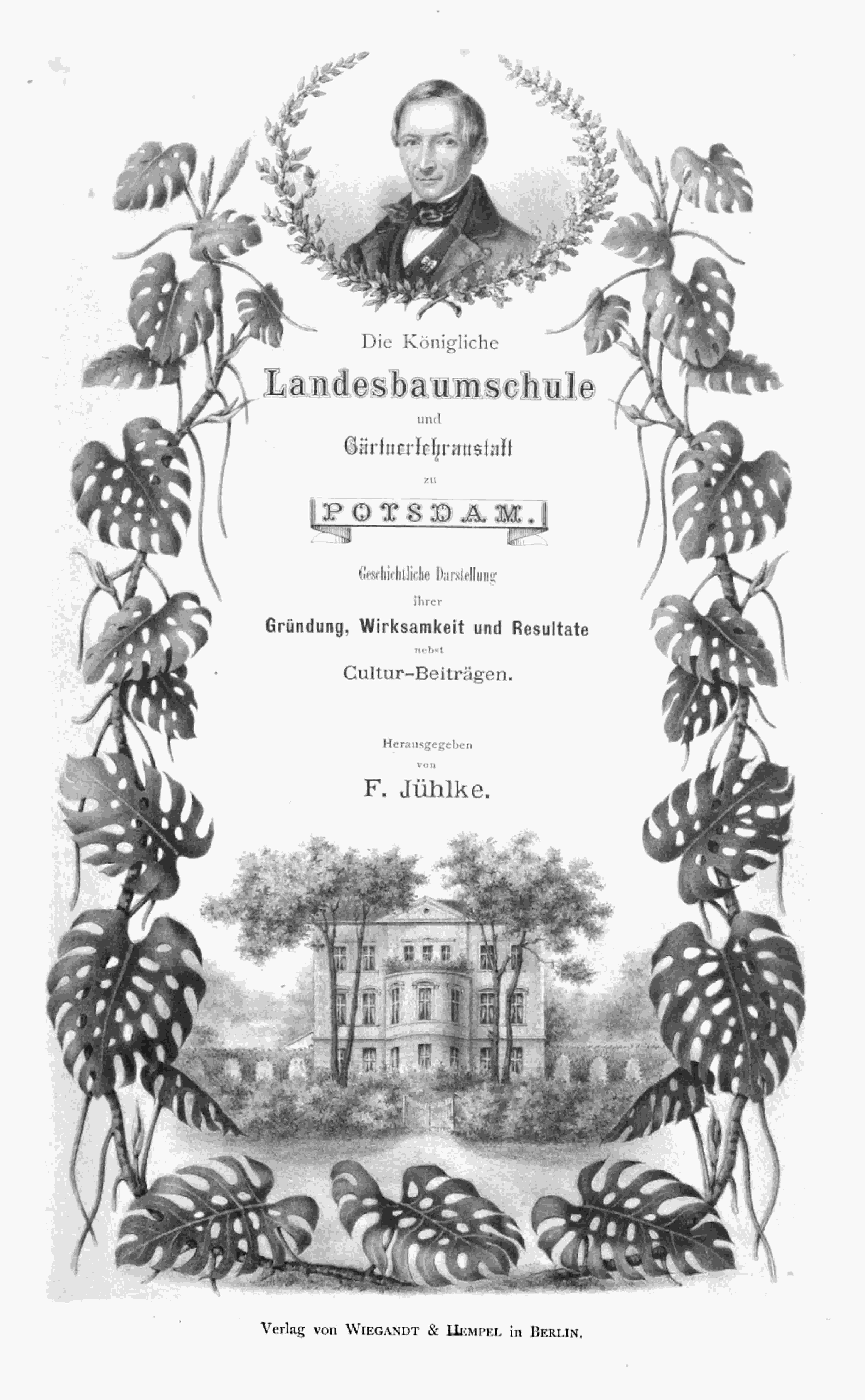 Titelseite von Jühlkes Schrift für die Landesbaumschule und Gärtnerlehranstalt (1872)